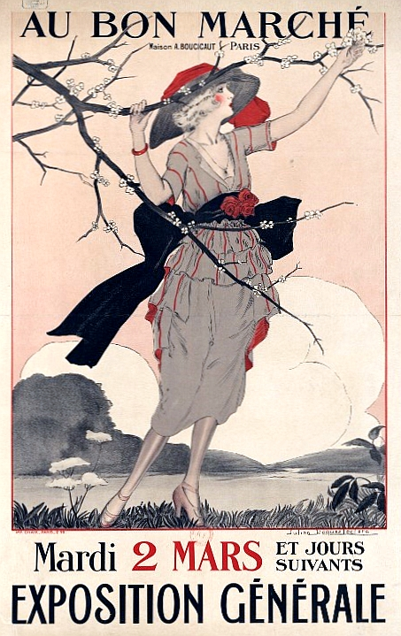 Affiche publicitaire : "Au Bon Marché. Maison A. Boucicaut, Paris. Mardi 2 mars et jours suivants, exposition générale."